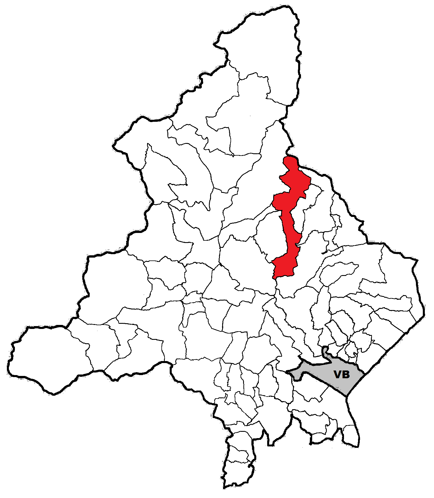 Posizione del comune nella provincia del Verbano Cusio Ossola (Verbania)